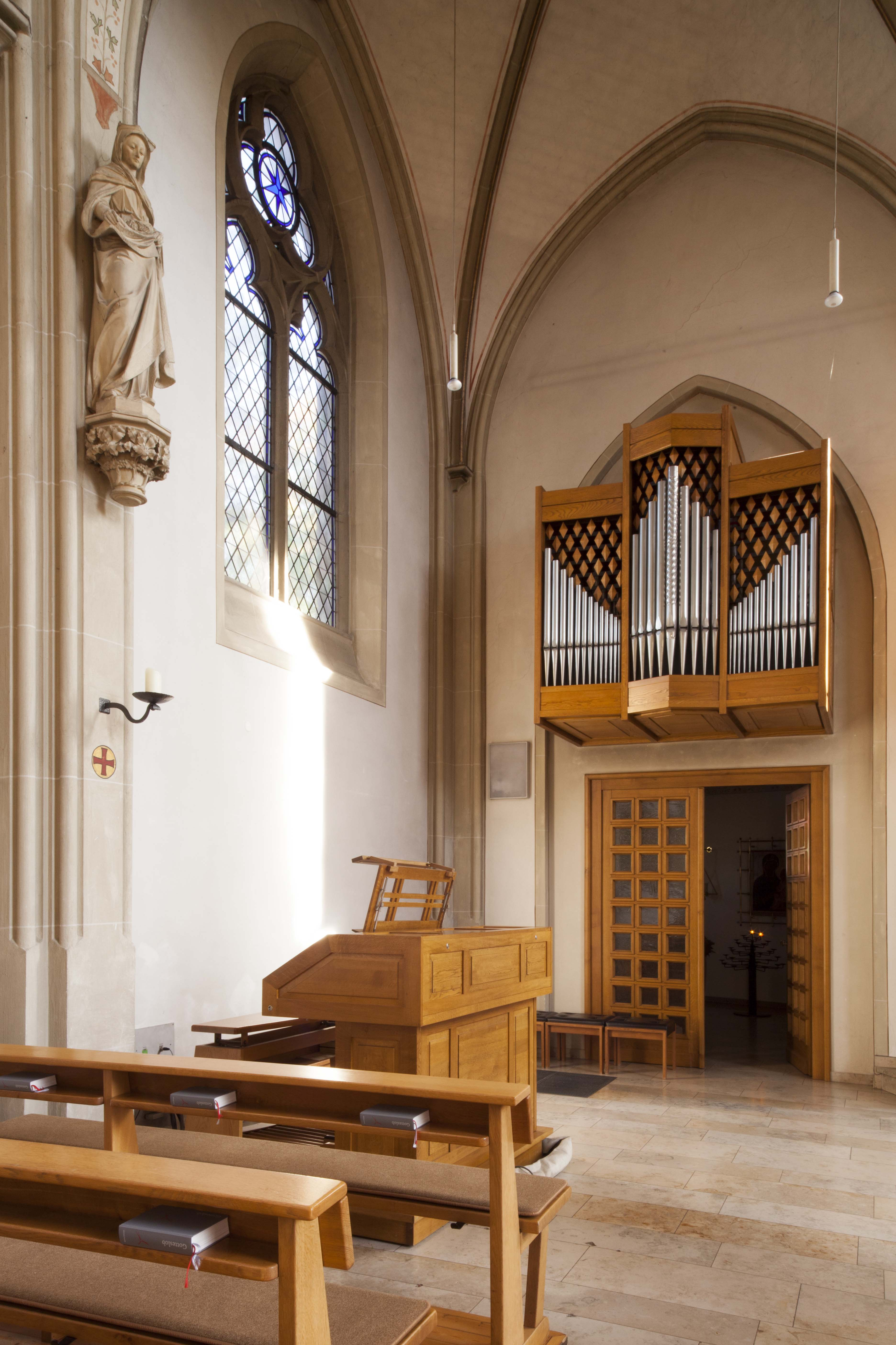 Chororgel, St. Johannes, Mesum